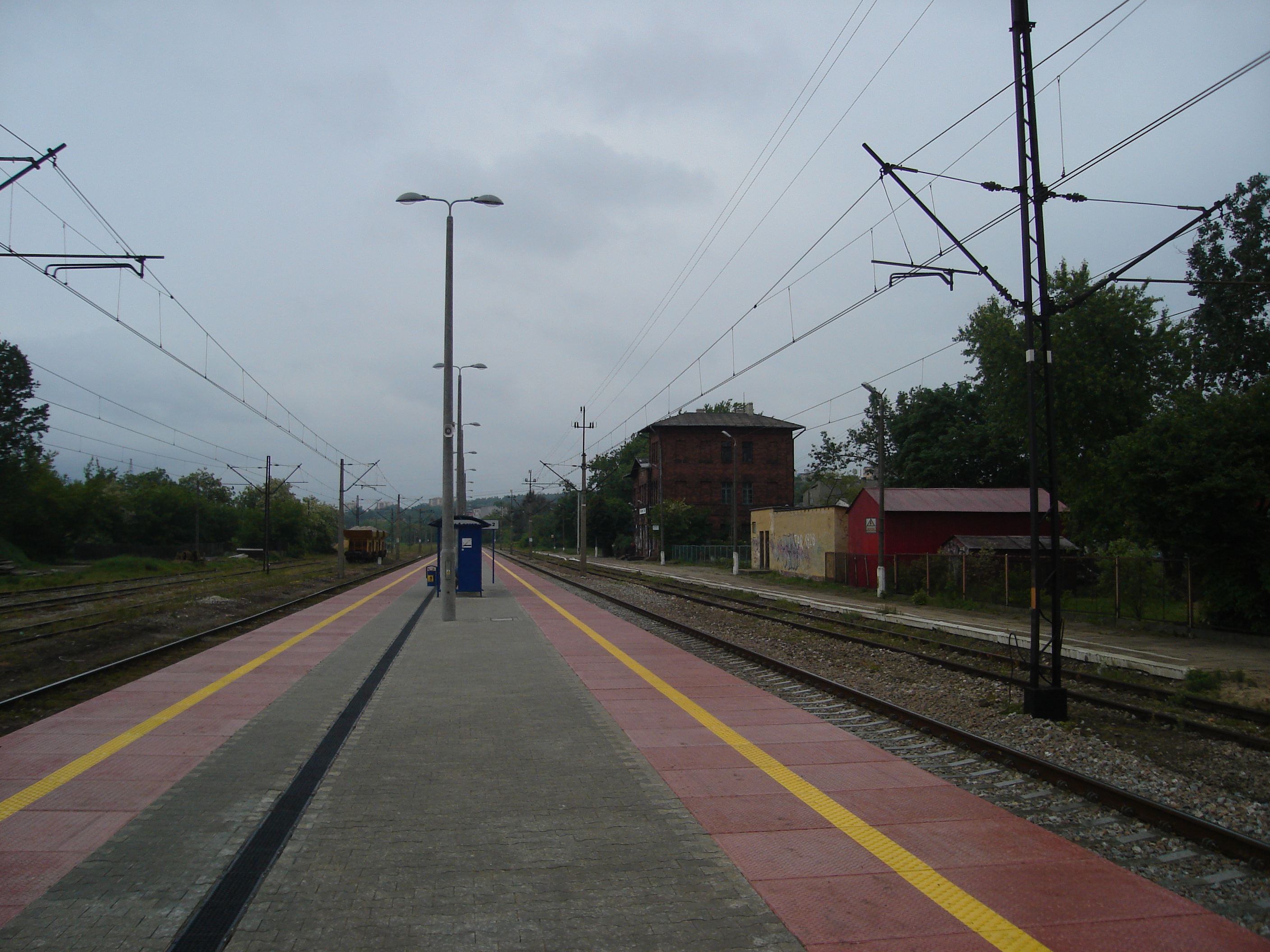 Stacja Starachowice Wschodnie